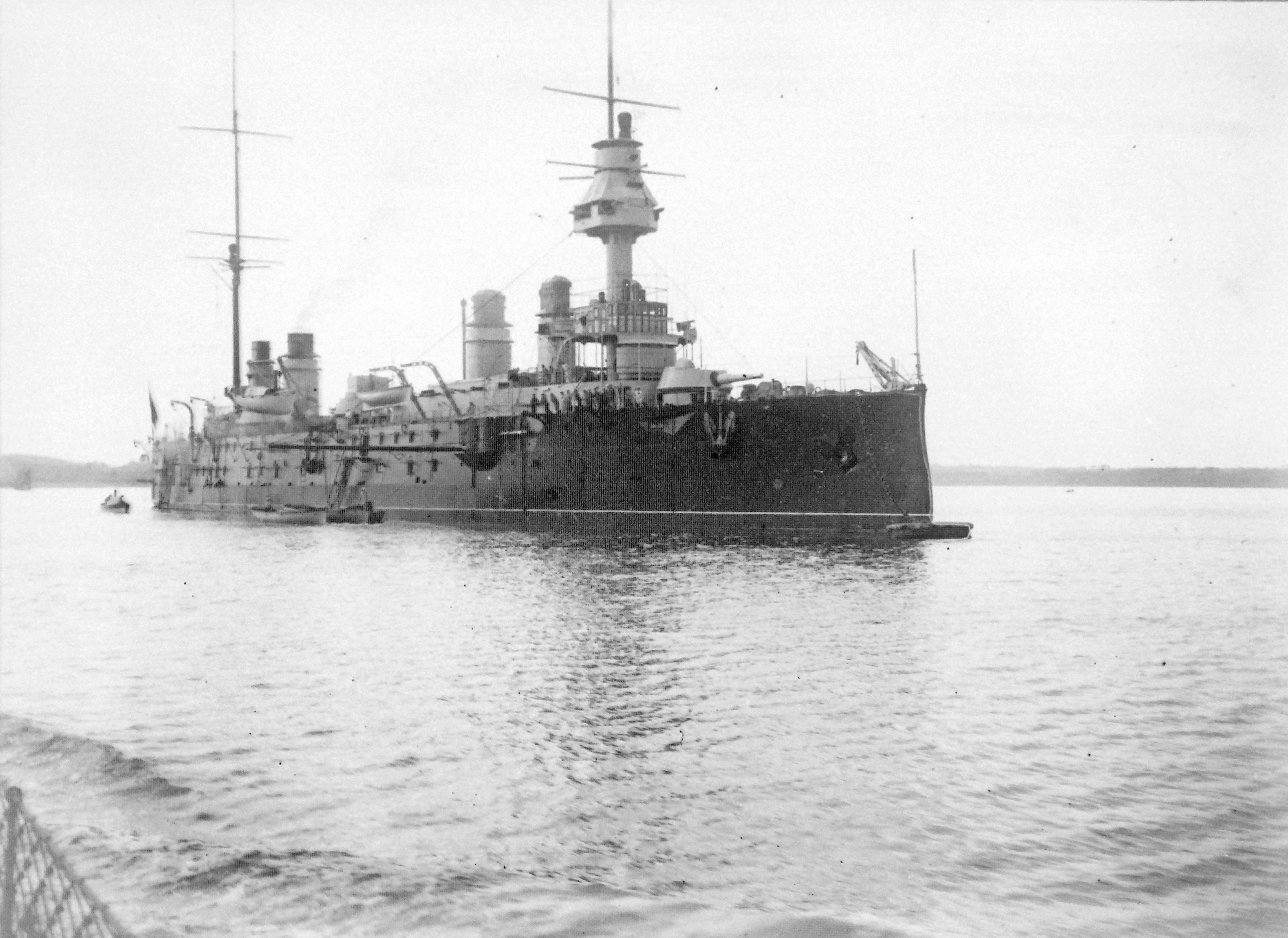 Fichier numérisé à partir d'une plaque de verre : le croiseur cuirassé de la classe Gloire "Amiral Aube" en rade de Lorient